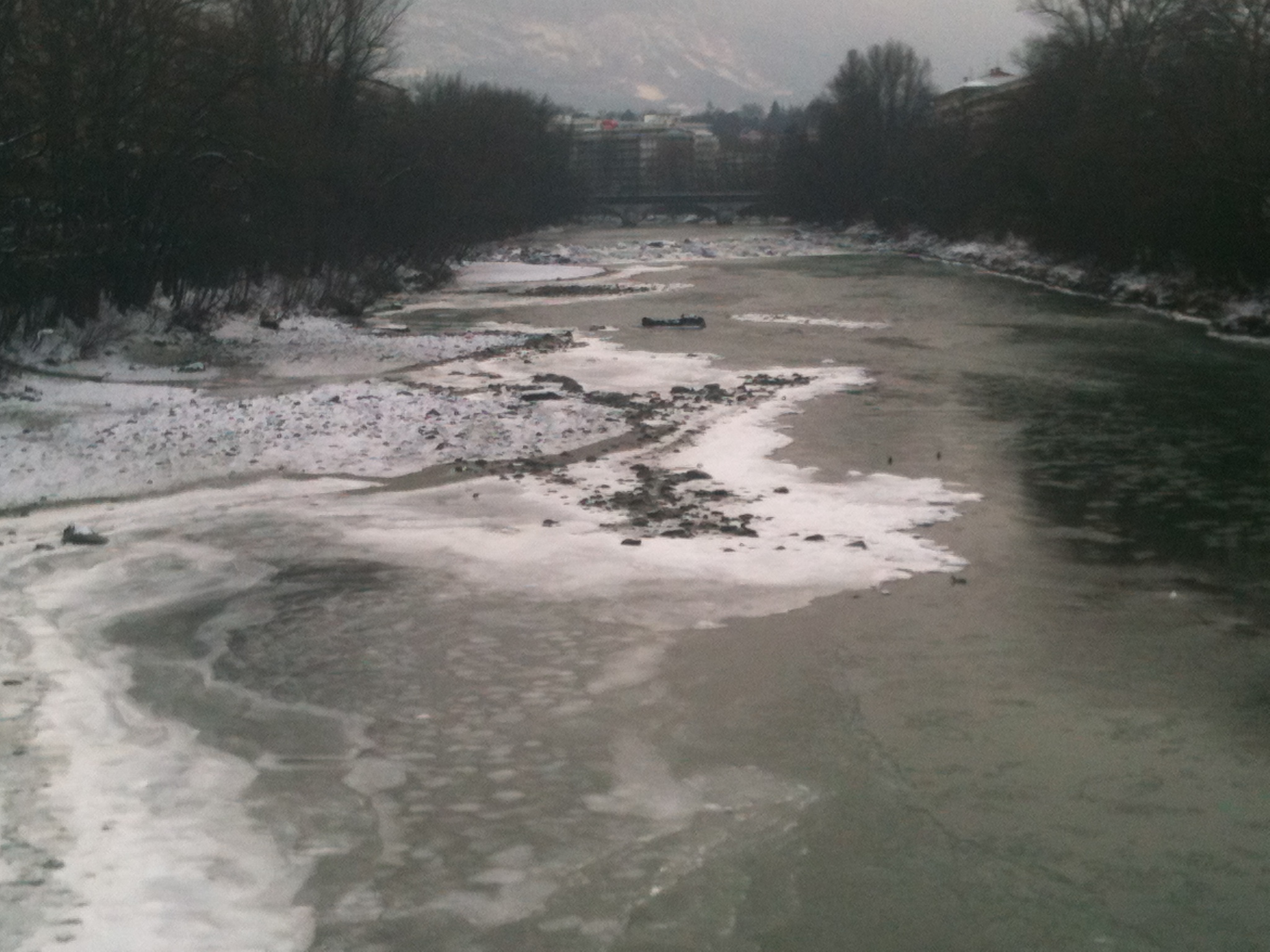 L'arve à Genève vue du pont d'arve / Geneva